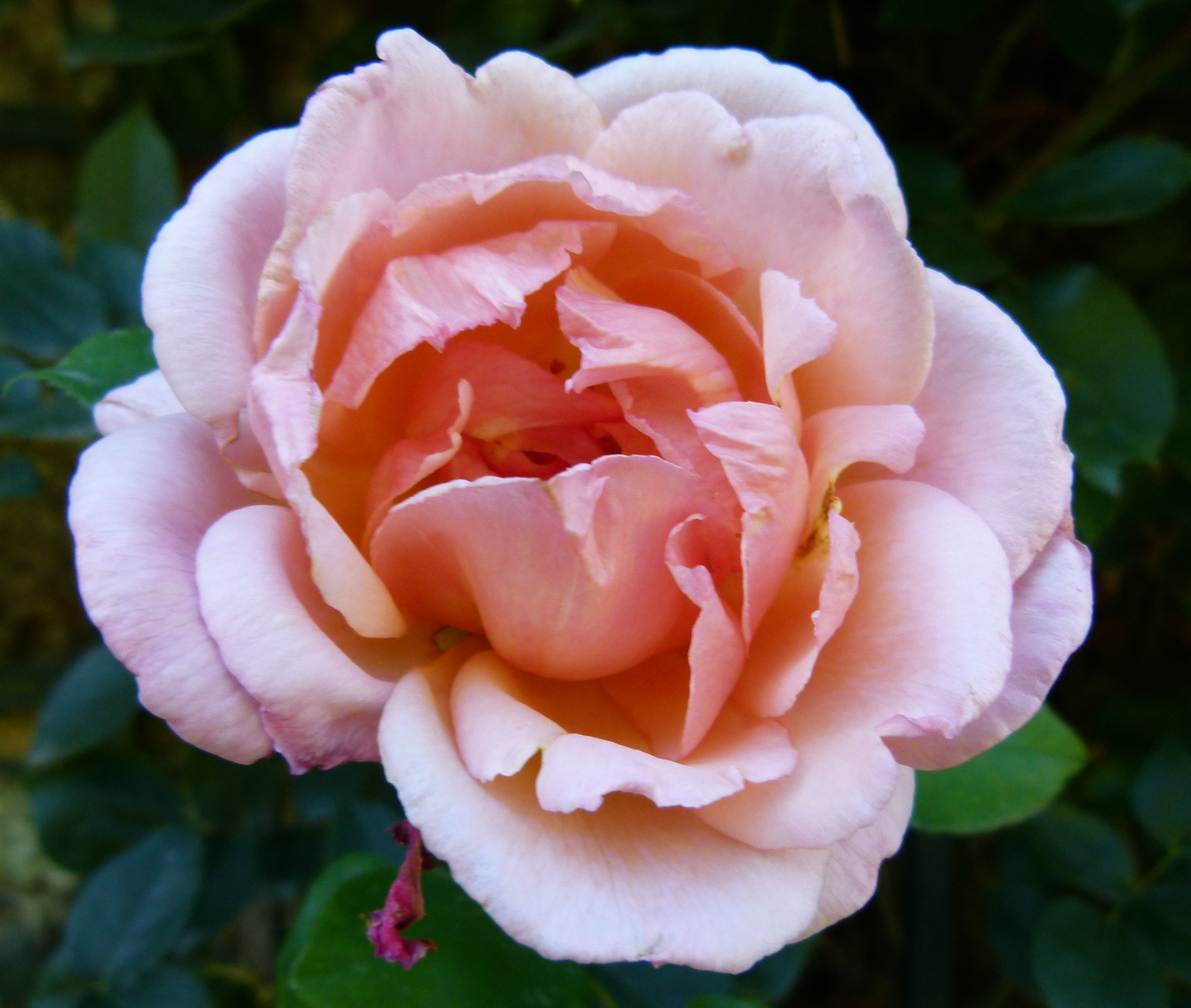 Belle de Londres aux Jardins de Bagatelle